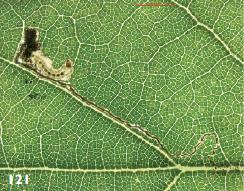 Ectoedemia pubescivora larva